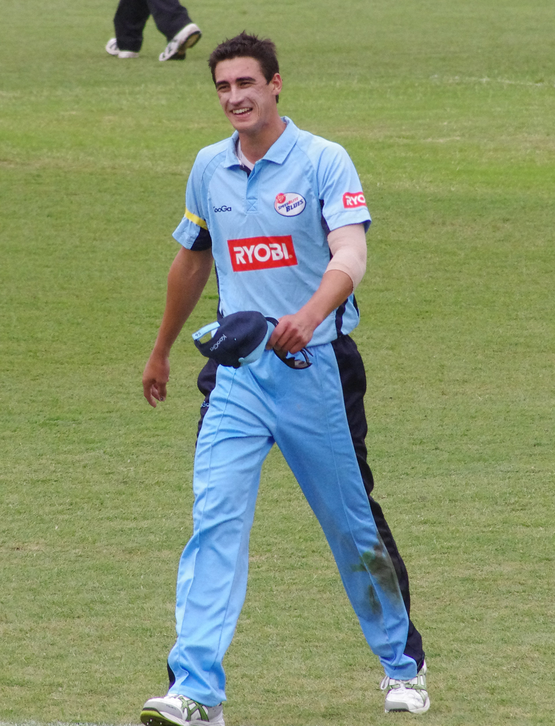 Mitchell starc